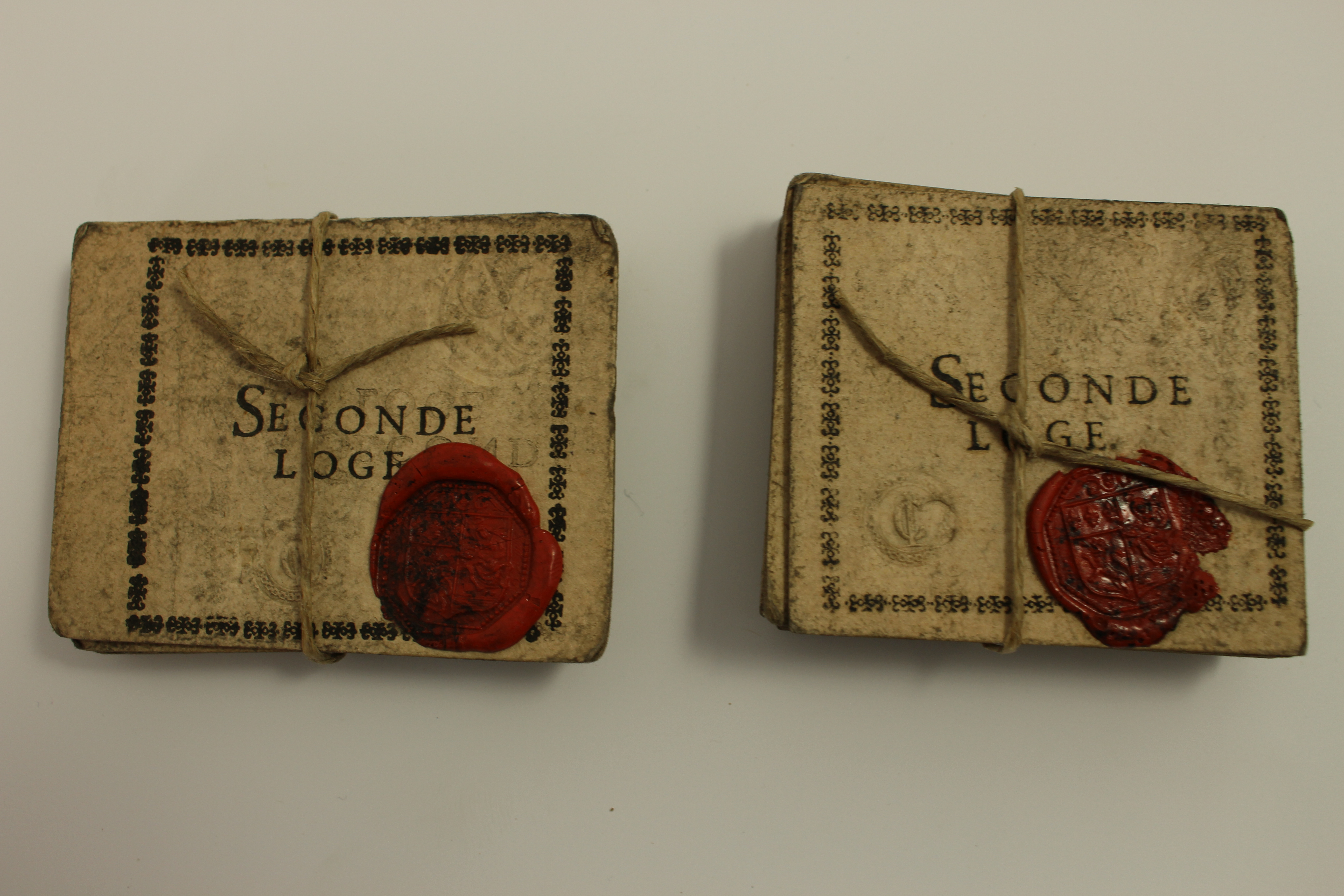 billet de théâtre "Seconde loge" ; Propriété : Musée des Hospices civils de Lyon INV : 2007.0.1939.M 177